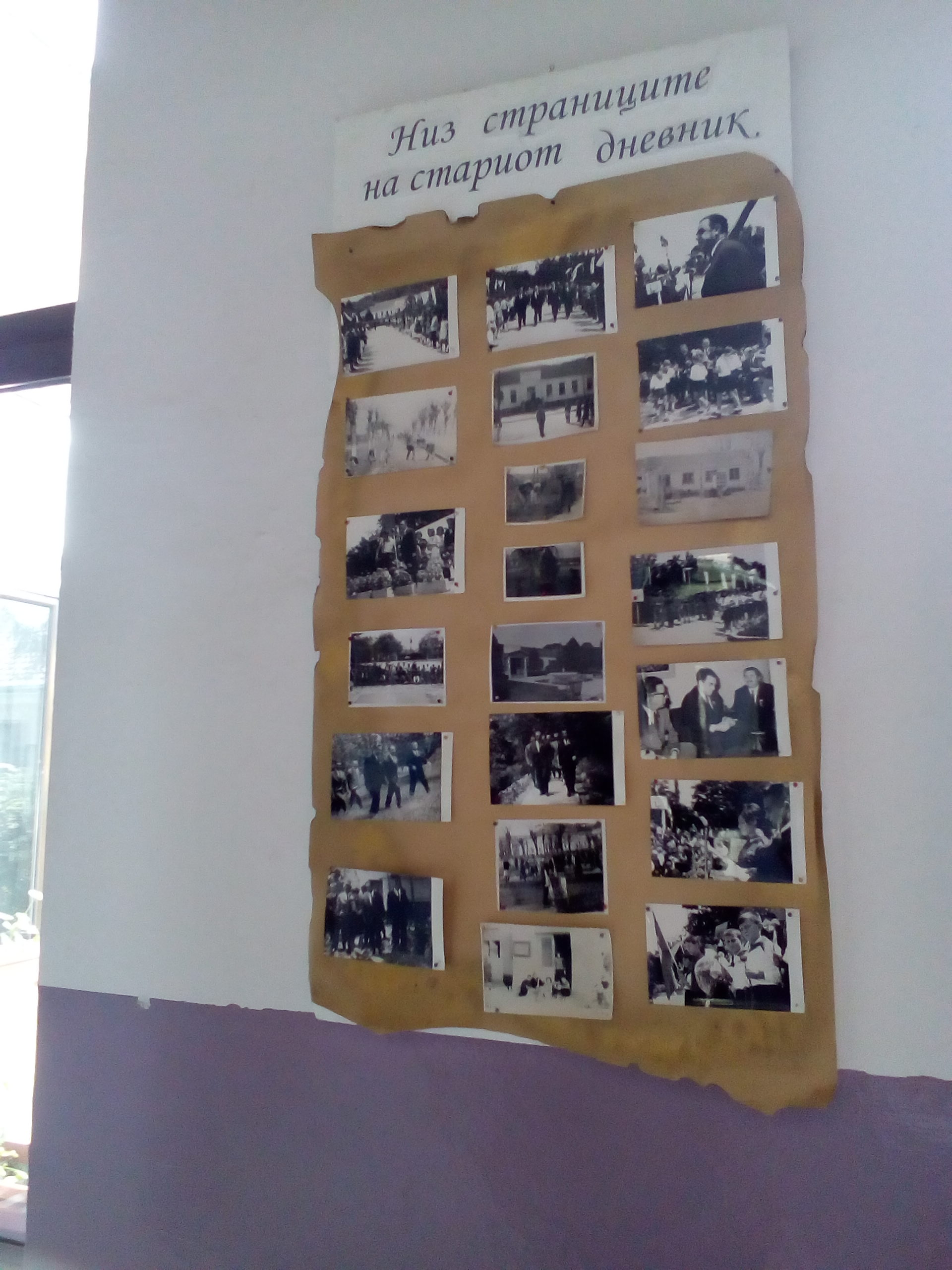 Училишно пано на тема : „Низ страниците на стариот дневник“ во ООУ Св.Климент Охридски с.Драчево